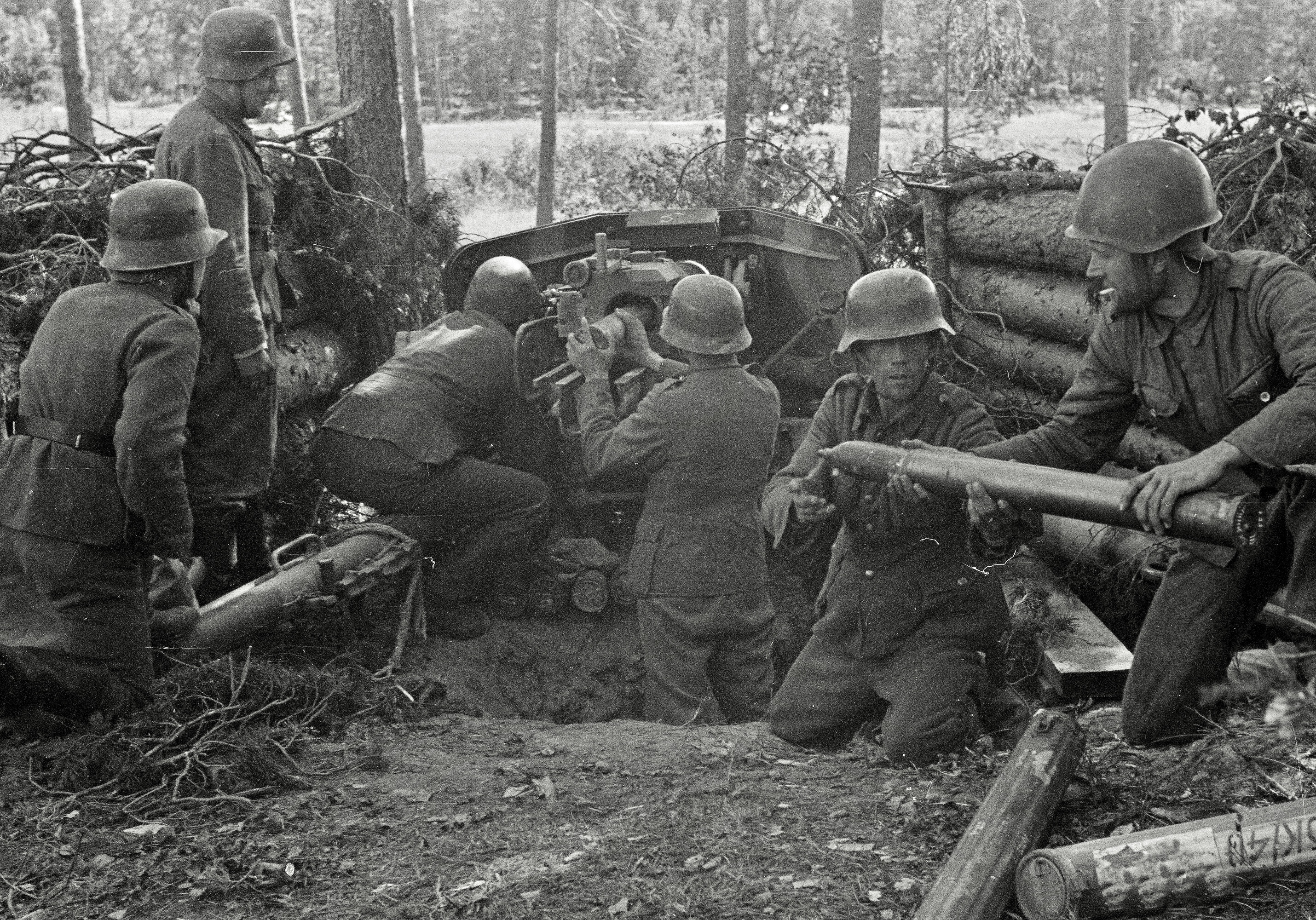 Meikäläinen panssaritorjuntatykki asemassa Vuosalmen sillanpääasemassa. Vuosalmen sillanpääaseman pohjois puoli ja Suursaari 1944.07.26